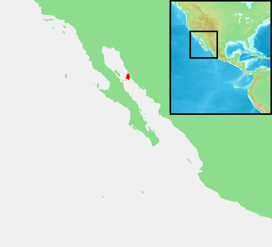 Tiburón_Island, Mexico